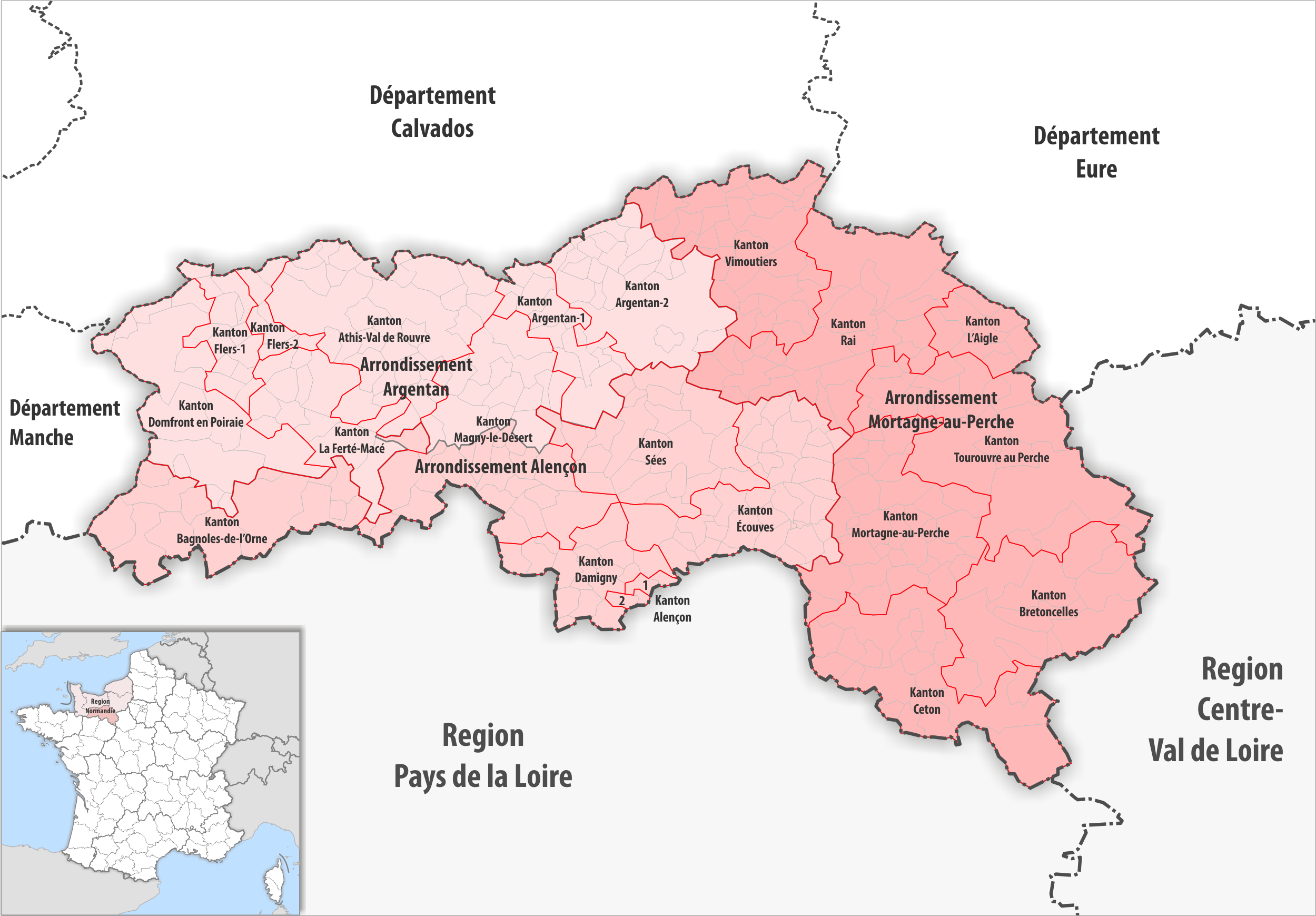 Gemeinden, Kantone und Arrondissemente im Departement Orne